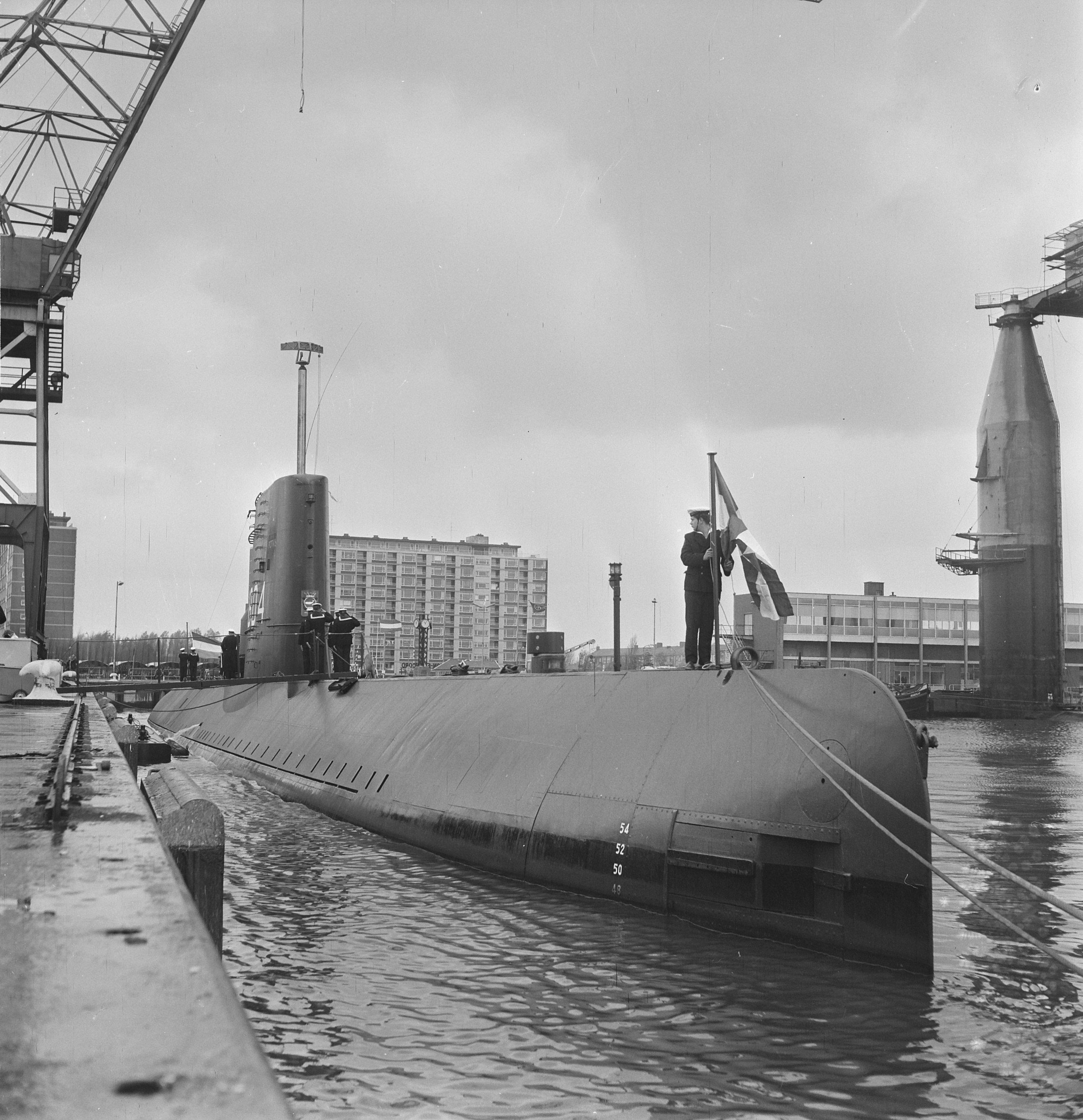 Collectie / Archief : Fotocollectie Anefo Reportage / Serie : Indienststelling van de Hr. Ms. Potvis- onderzeeboot van de Koninklijke Marine bij de werf Wilton Fijenoord te Schiedam Beschrijving : Het hijsen van de vlag Datum : 2 november 1965 Locatie : Schiedam, Zuid-Holland Trefwoorden : marine, matrozen, militaire vaartuigen, onderzeeërs, plechtigheden, vlaggen Instellingsnaam : Wilton-Fijenoord Fotograaf : Voets, Jan / Anefo Auteursrechthebbende : Nationaal Archief Materiaalsoort : Negatief (zwart/wit) Nummer archiefinventaris : bekijk toegang 2.24.01.03 Bestanddeelnummer : 918-3929